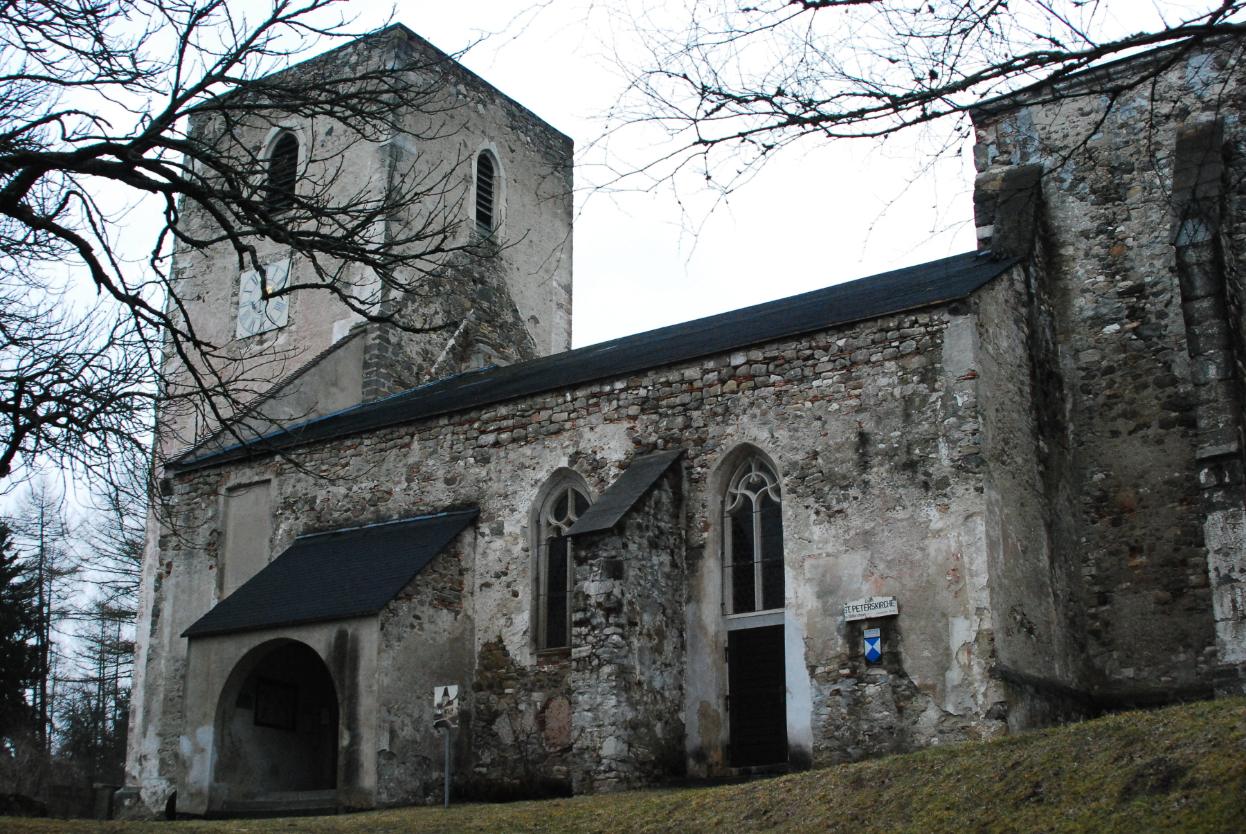 Kirche von Döllersheim auf dem Areal des Truppenübungsplatzes Allentsteig in Niederösterreich